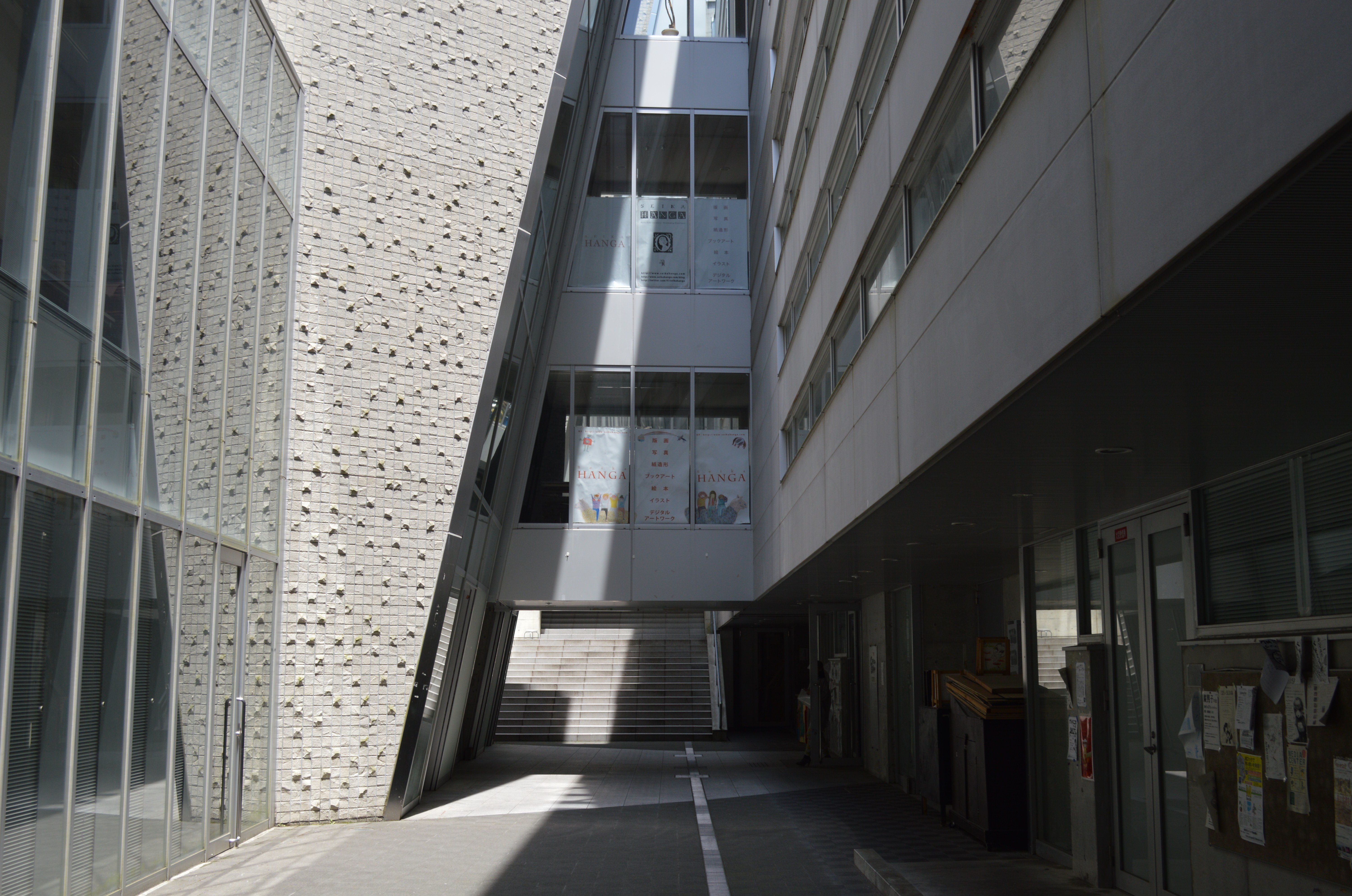 京都市左京区岩倉 京都精華大学 対峰館内部の通路